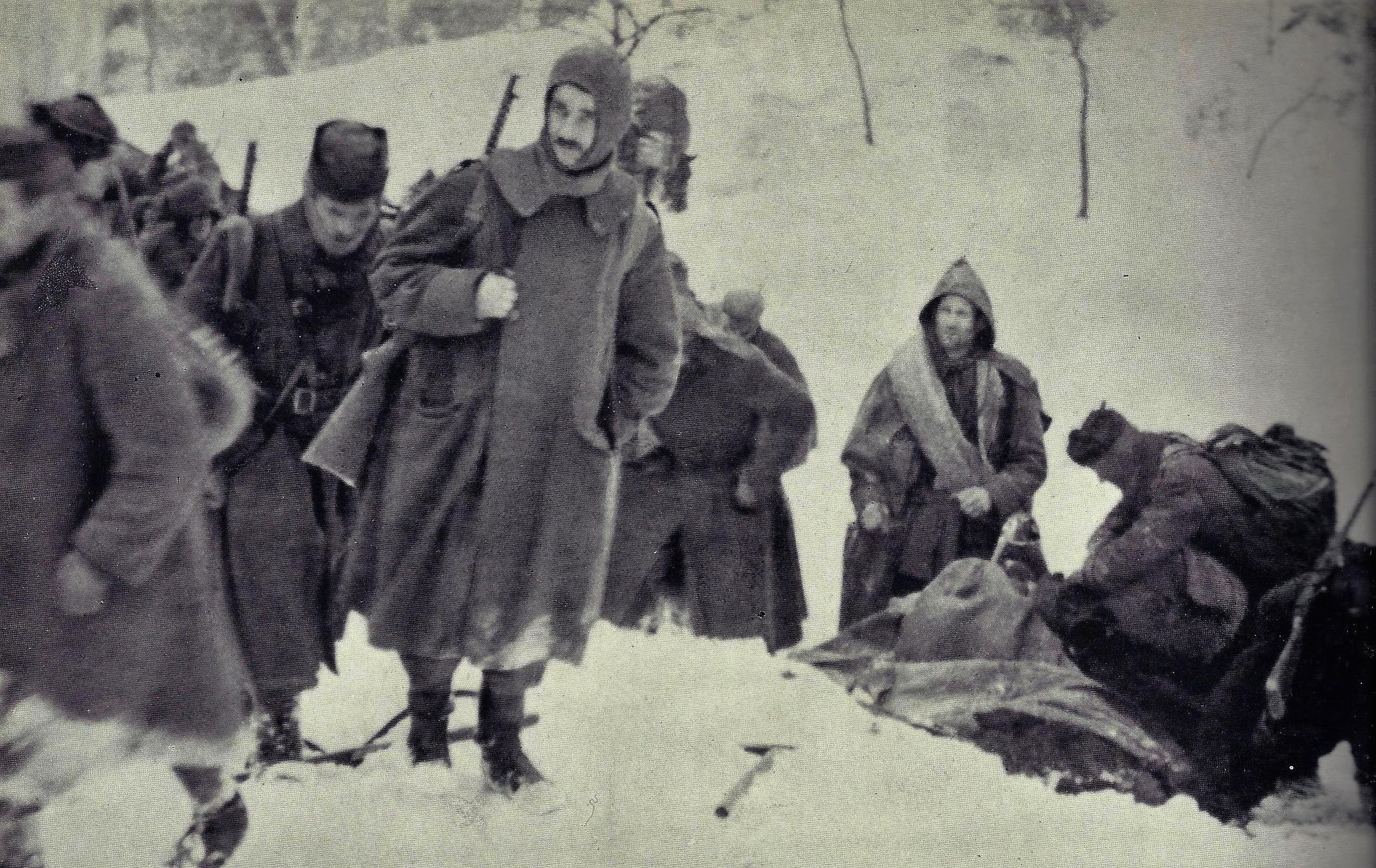 Zadnja fografija Karla Destovnika Kajuha, Paški Kozjak 16.2 1944. Ob Kajuhu kipar Janez Weiss (levo), desno pa spremljevalec Edvard Marušič- Blaž